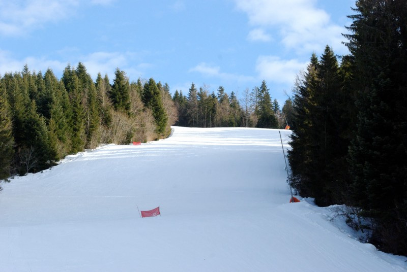 une des pistes de descente de Mouthe